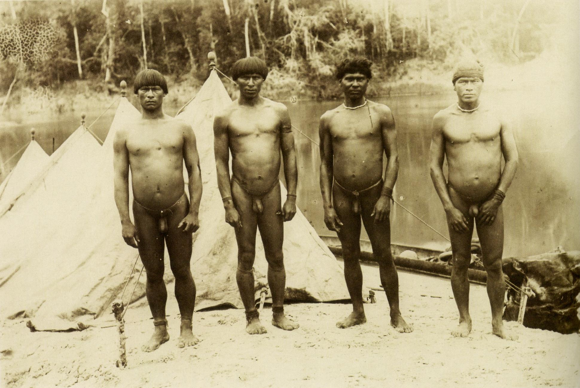 Índios da tribo Meinaco no Pará, 1894.